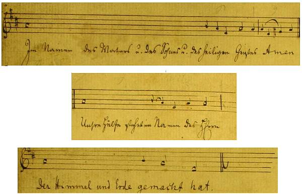 Karl Kuhlo: Singweise zur Eröffnung des Gottesdienstes für die Valdorfer Kirche, Autograph („Im Namen des Vaters u. des Sohnes u. des heiligen Geistes. Amen. Unsre Hülfe stehet im Namen des HErrn. Der Himmel und Erde gemacht hat.“)